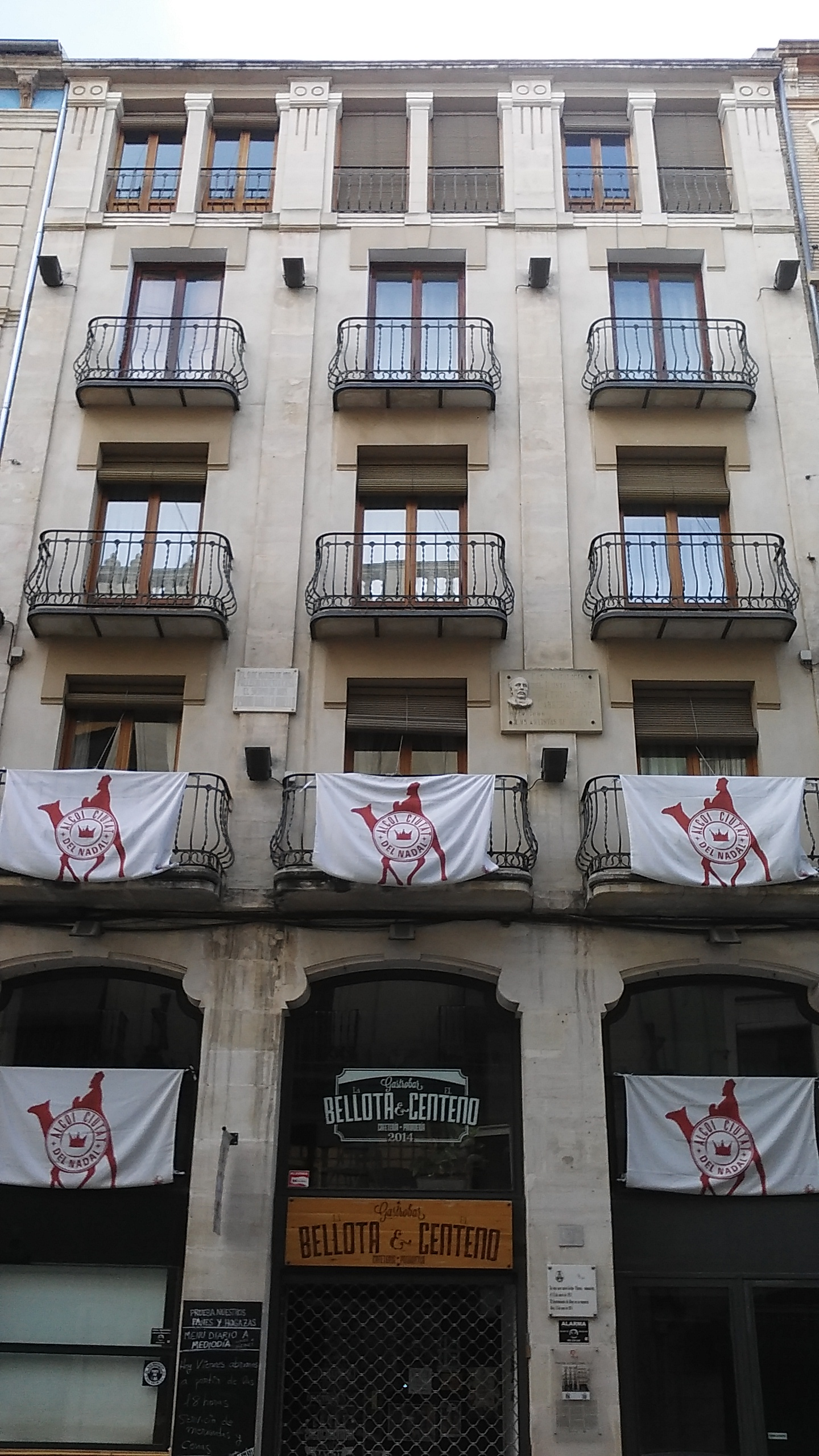 Edifici moderniste en carrer Sant Llorenç 3, en Alcoy (Alacant). Obra de l'arquitecte Timoteu Briet Montaud.